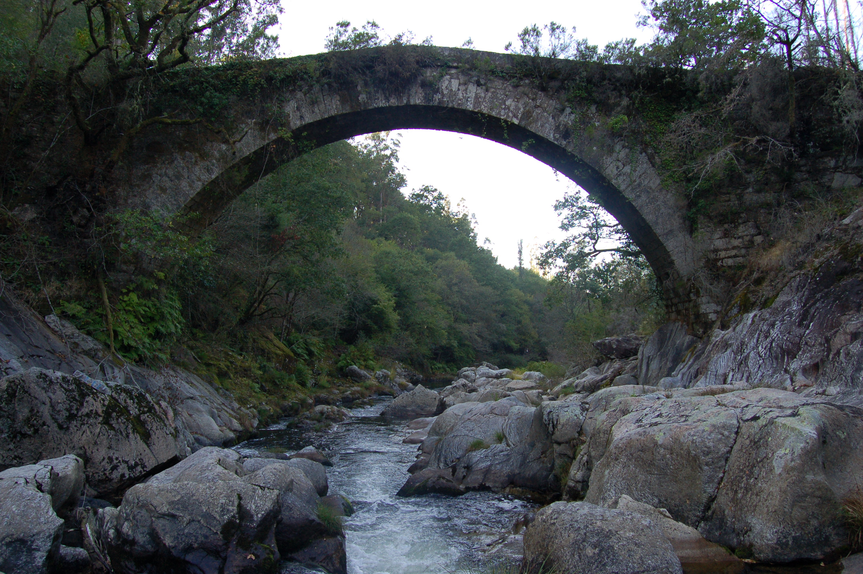 Río Lérez en San Xurxo de Sacos, (Cotobade)